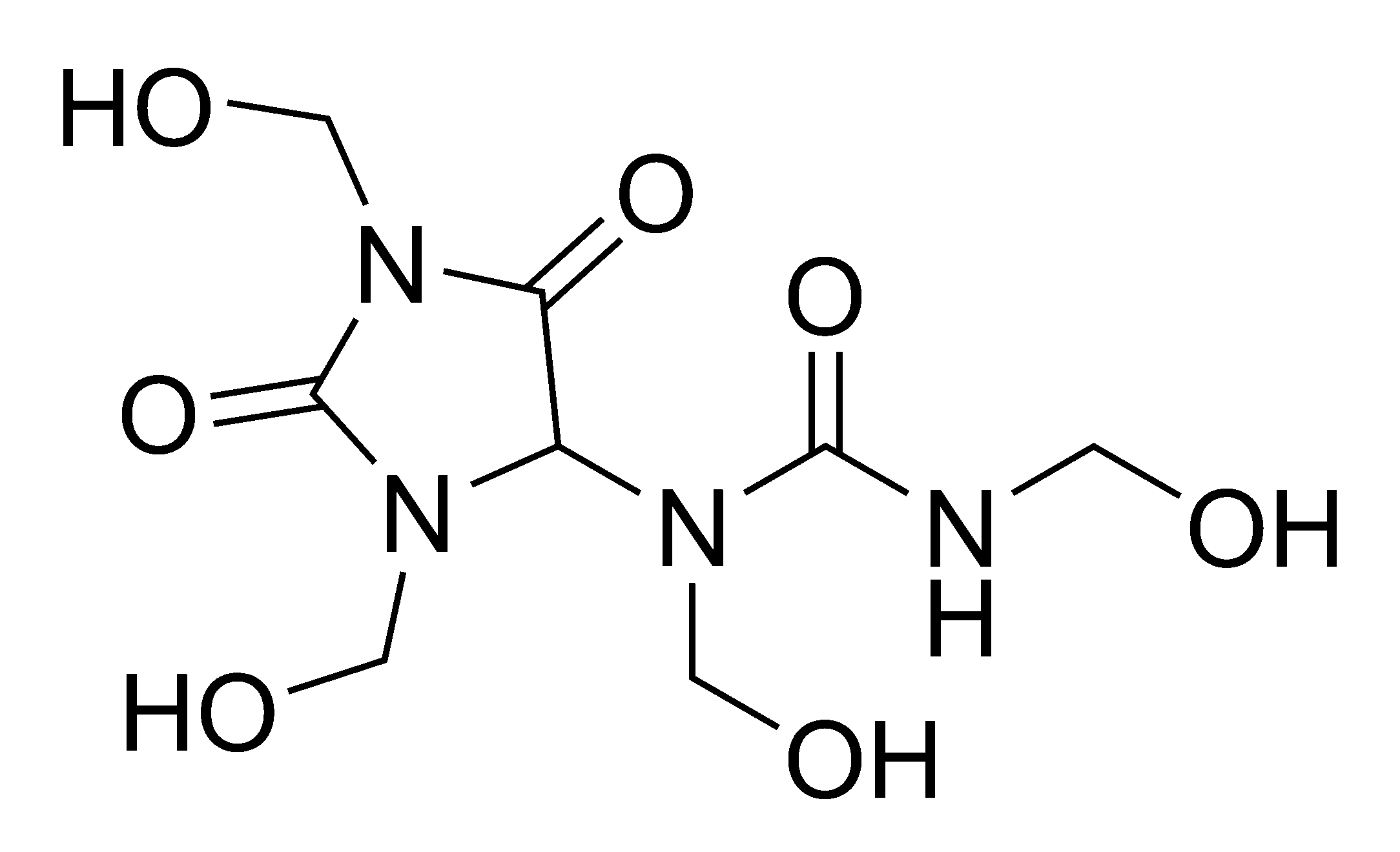 Chemical structure of diazolidinyl urea (old erroneous formula)